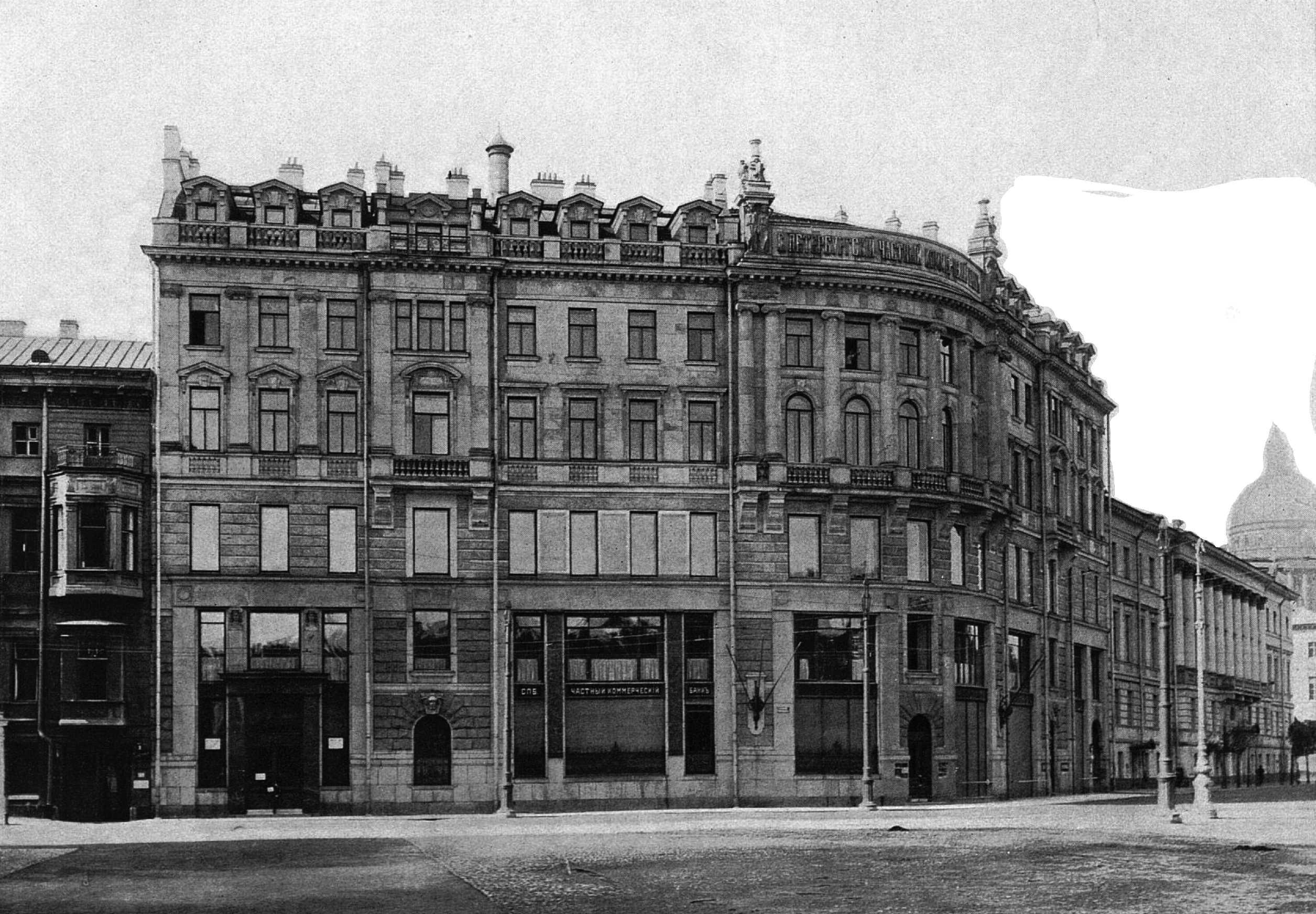 Невский, 1, 1914 год